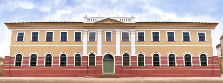 Centro de Cultura de Rio Pardo